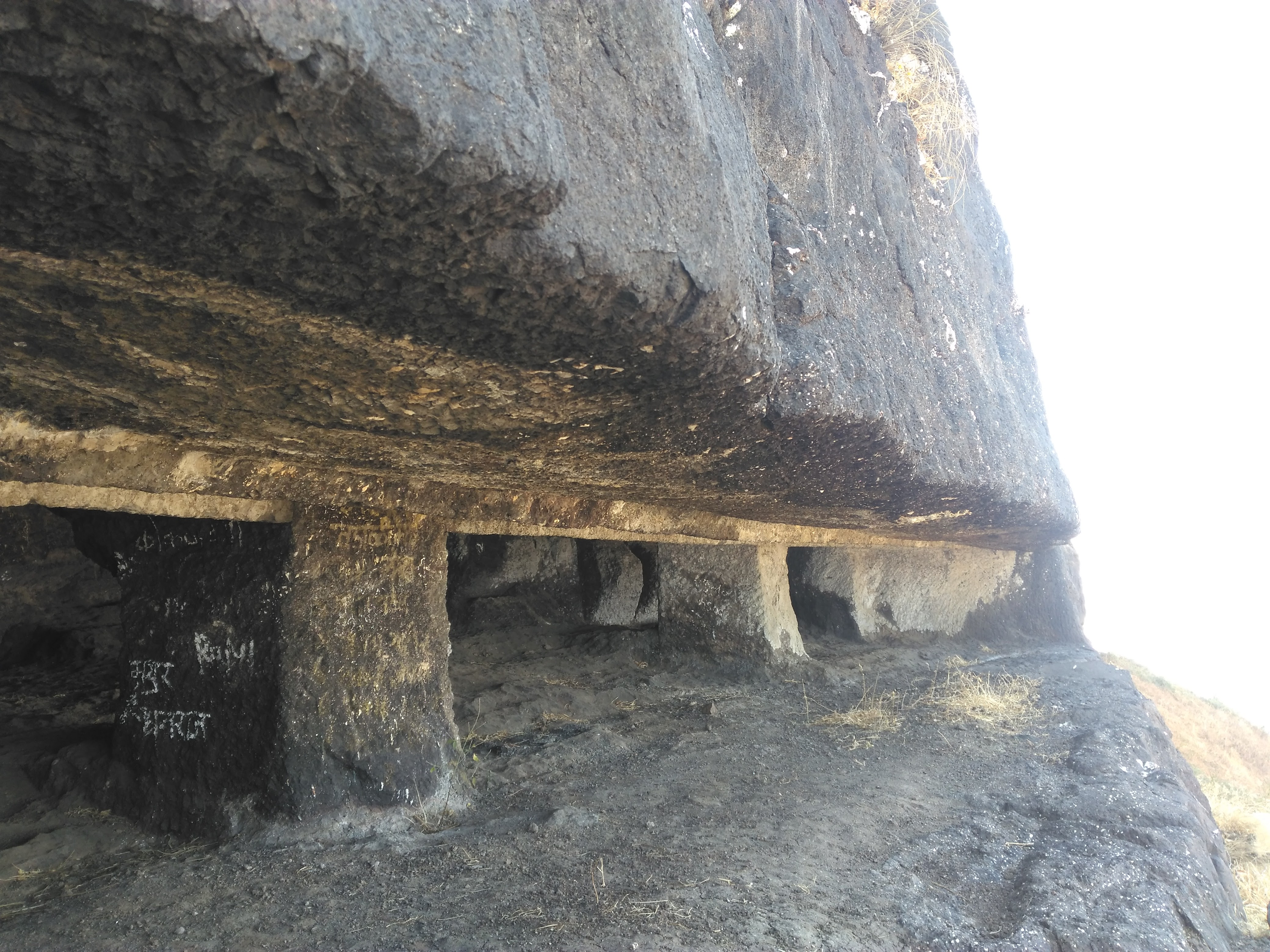 धोडप समोरील गुहा